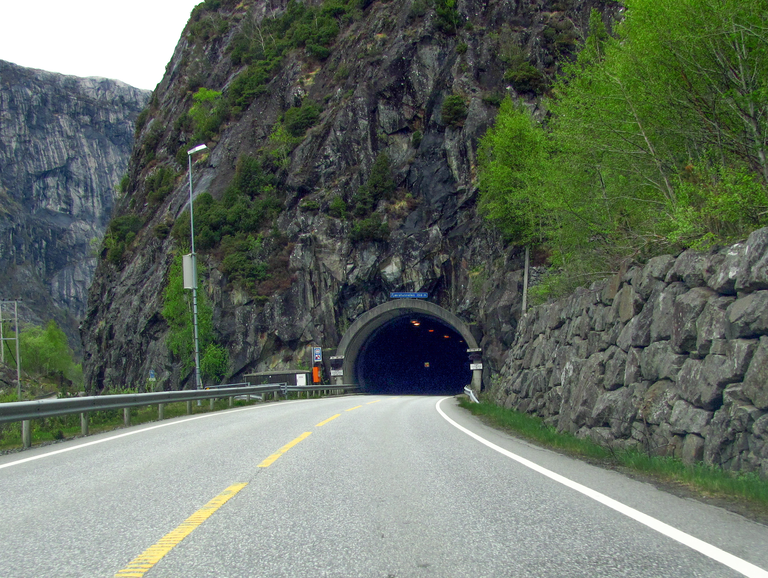 Fjæratunnelen på europavei 134 i Etne kommune i Hordaland. Tunnelen går langs Åkrafjorden mellom Eljarvika og Fjæra.